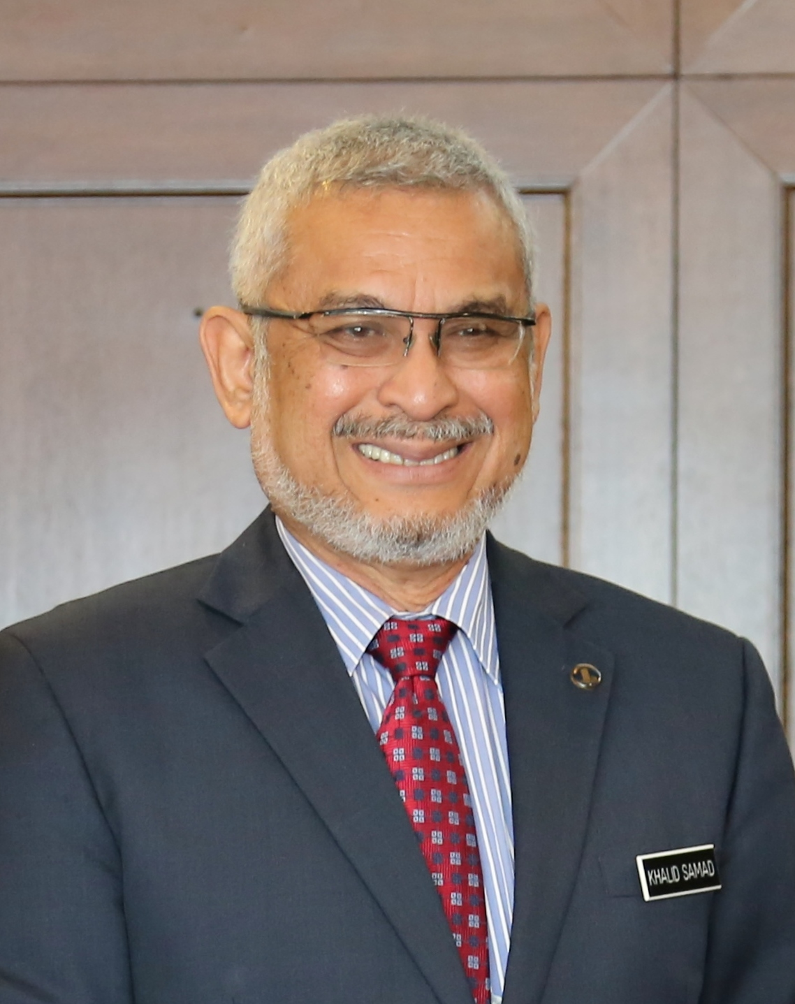 Ambassador Kamala meet YB Tuan Haji Khalid bin Abdul Samad Minister of Federal Territories